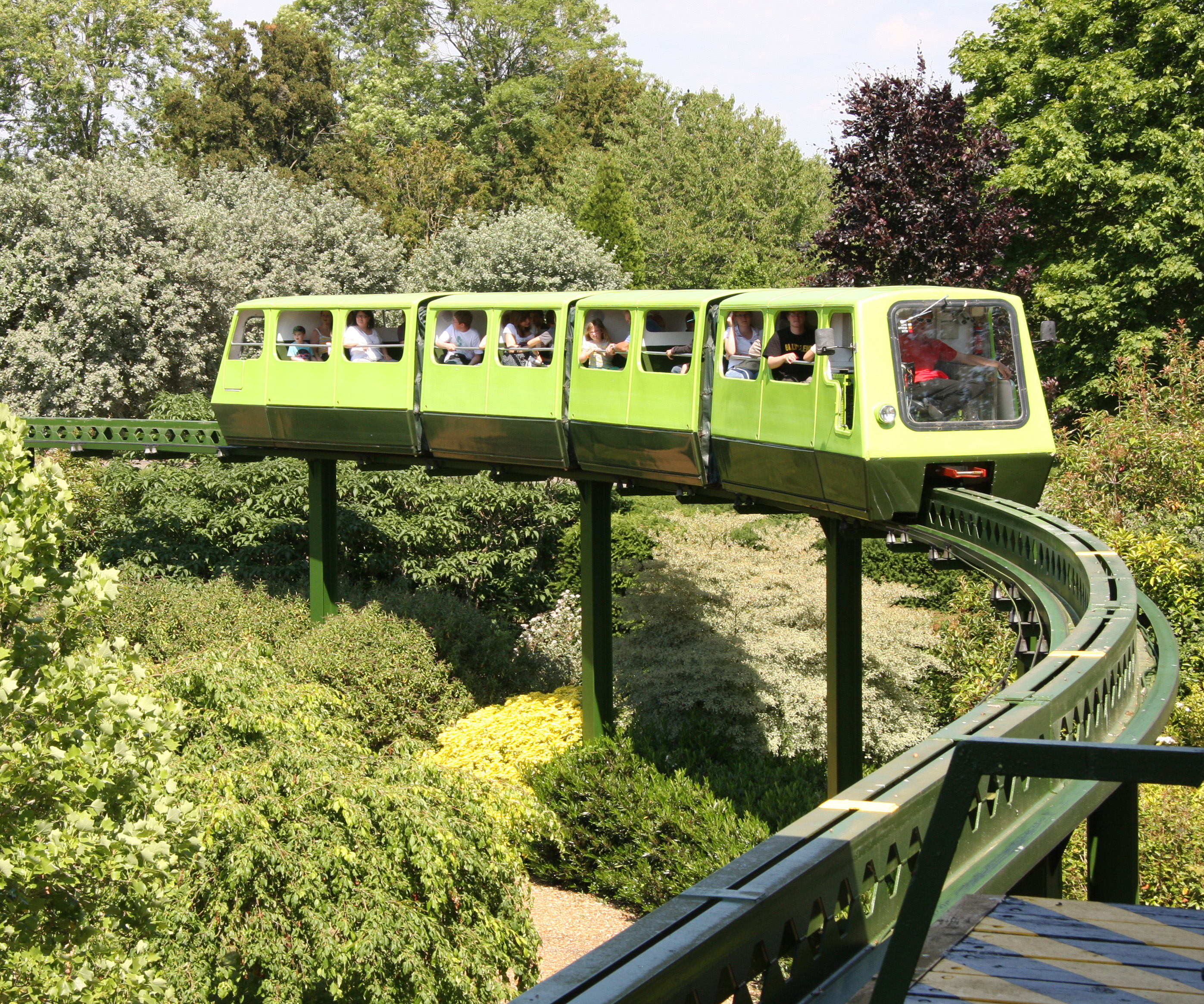 Beaulieu monorail